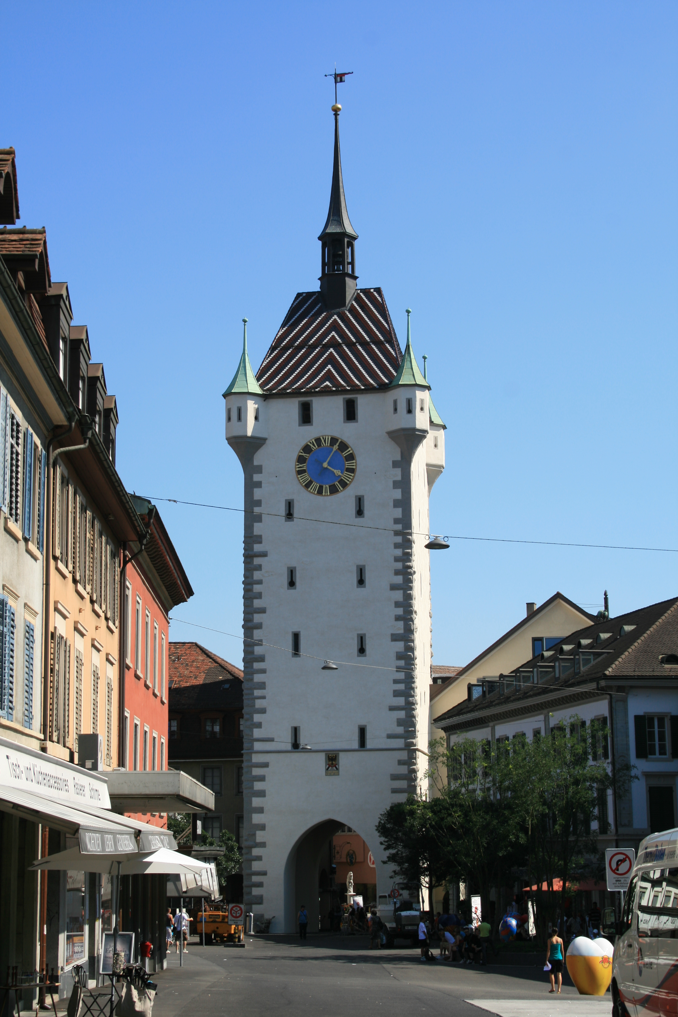 Stadtturm Baden, neu renoviert und ohne Gerüst Im Stil wie vor der Renovation von 1925 Schweiz